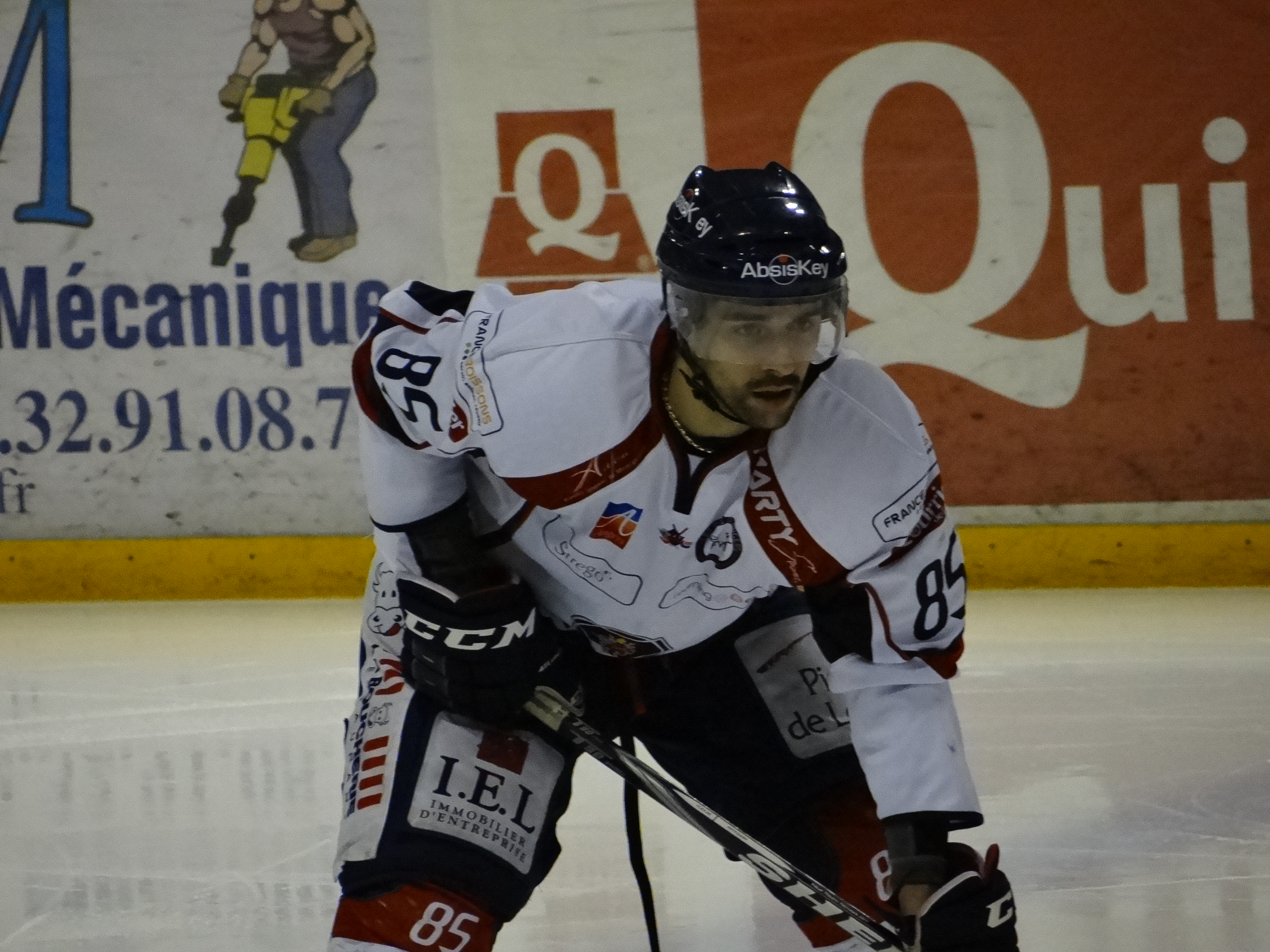 Photographie Gary Lévèque lors de Rouen Angers en janvier 2013